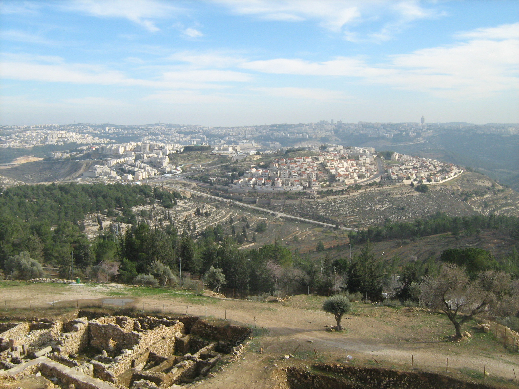 ג'למה. בית המעצר. וכבישים 70 ו-75 נפגשים בצומת העמקים